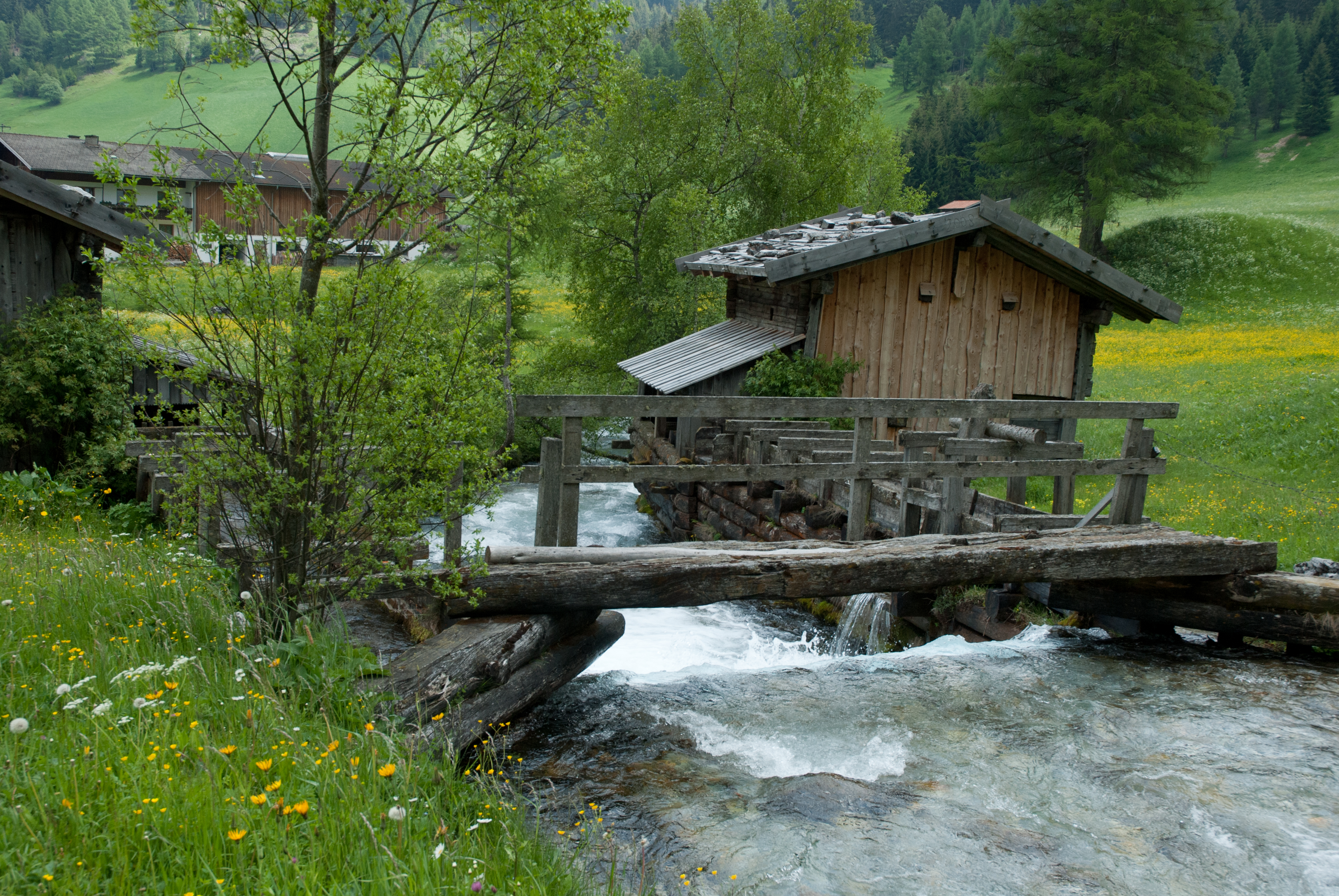 Die Frader-Mühle in Obernberg am Brenner und Michelsmühle (links)